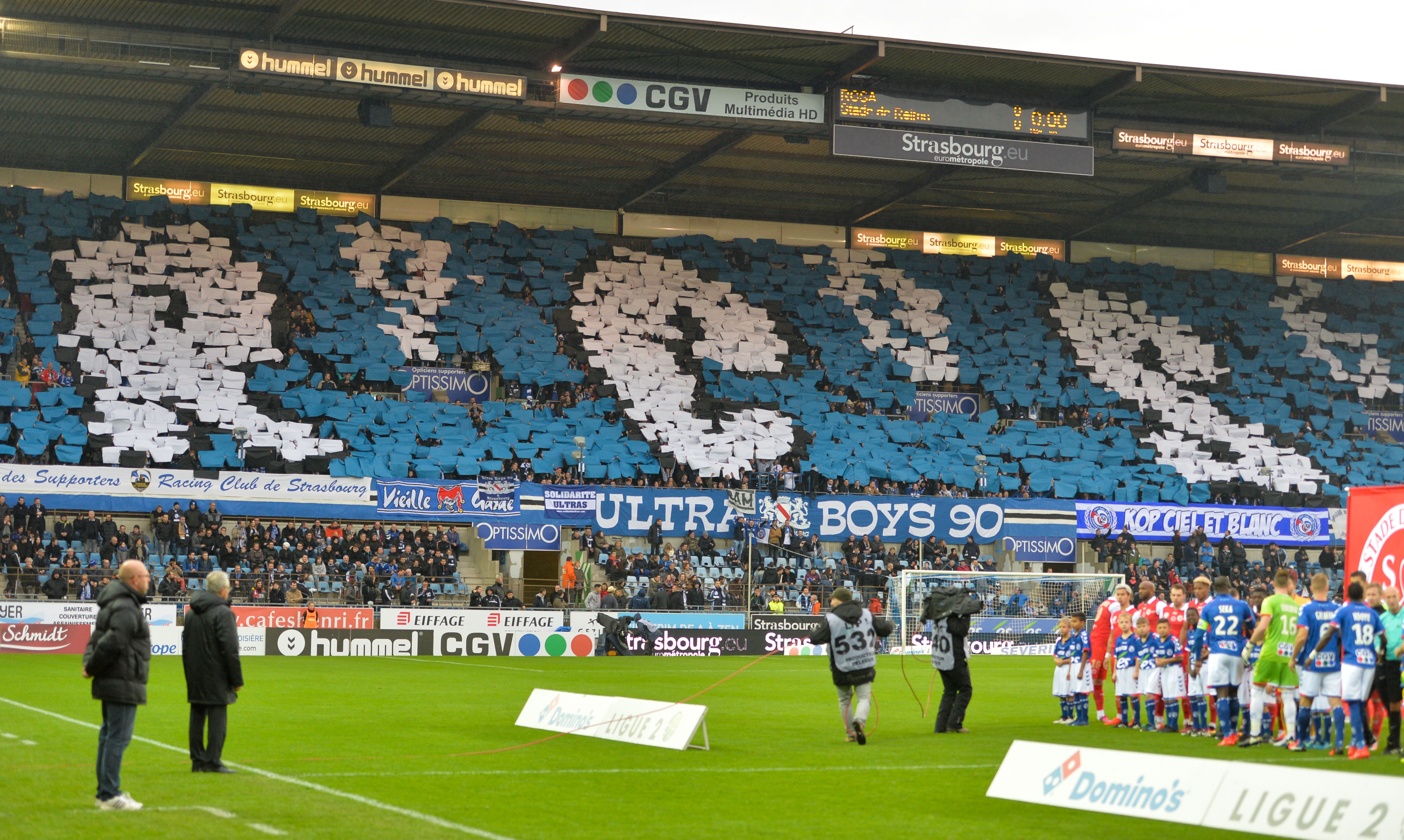 tifo RCSA Racing Club de Strasbourg Alsace au stade de la Meinau. photo Franck KOBI / Haguenau port 06.81.38.09.98